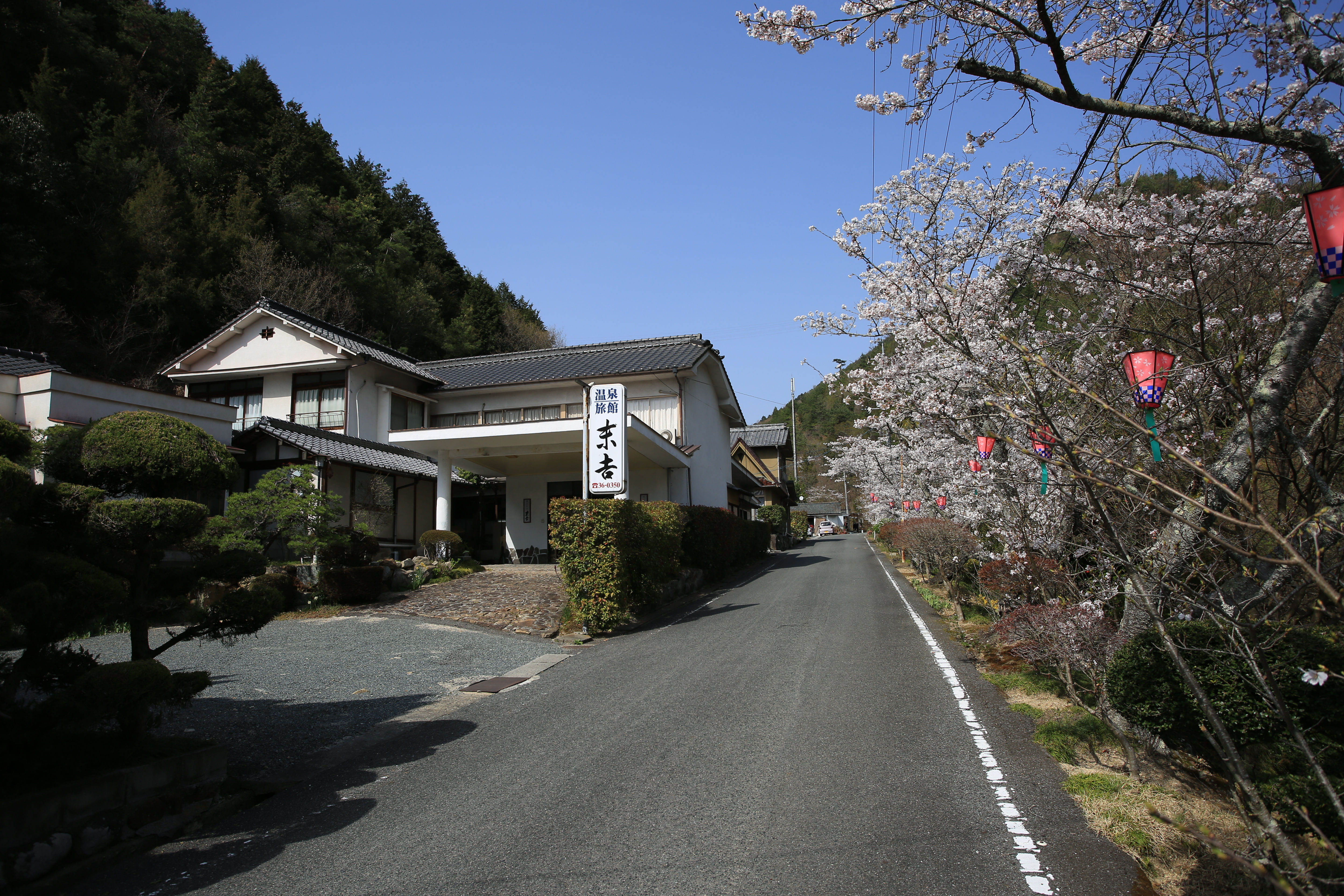 広島県福山市本郷町本郷温泉地区 2018年3月31日、桜満開。最後まで営業していた末吉旅館。広島県道158号線沿い。